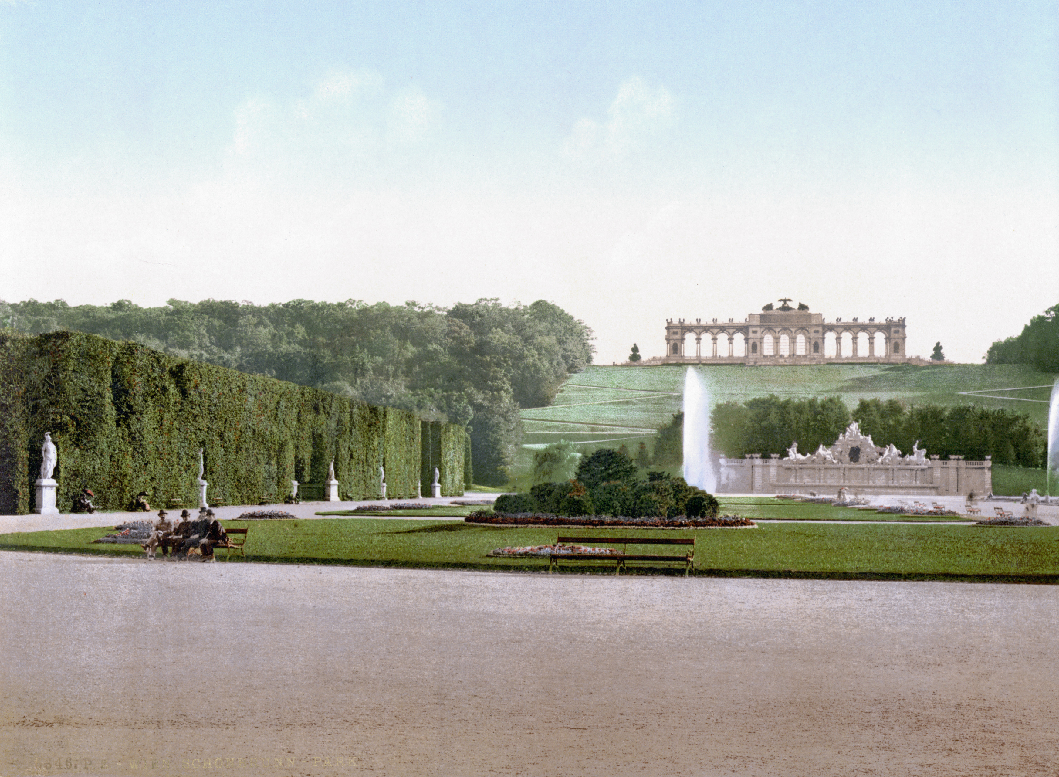 Schloss Schoenbrunn in Wien um 1900